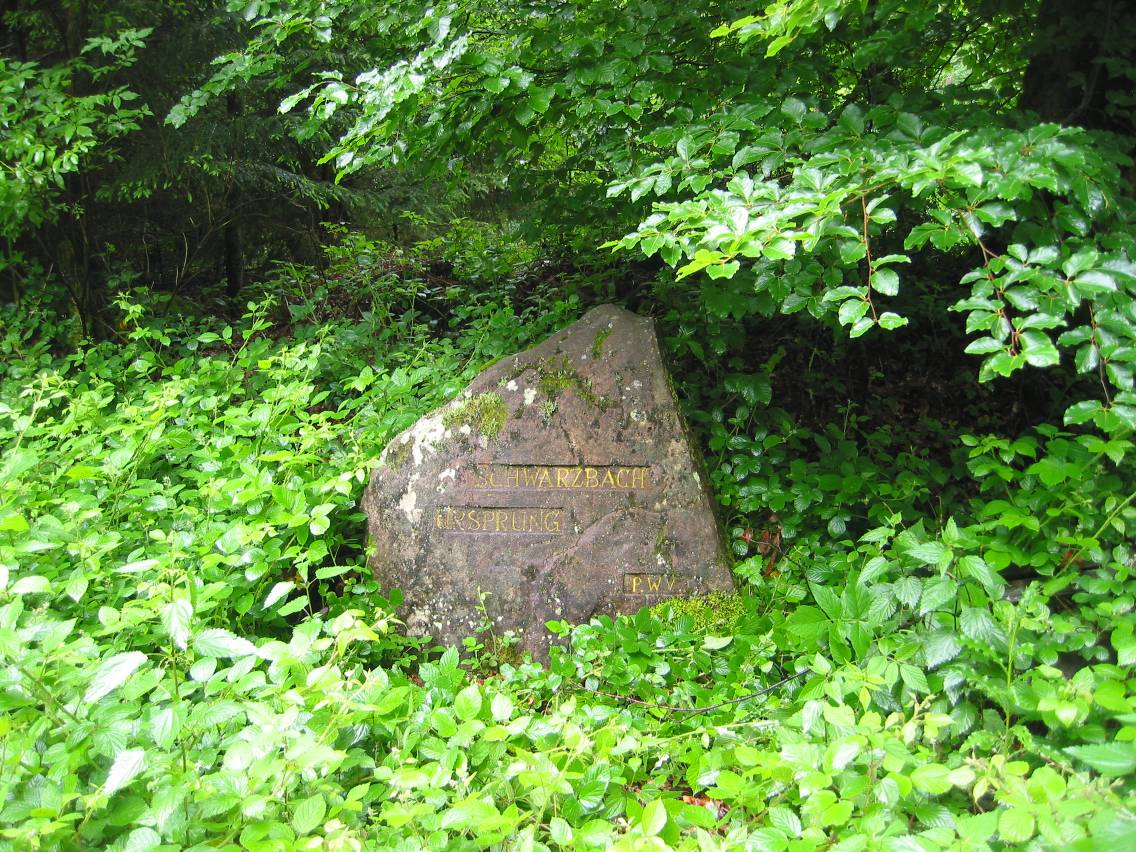 Ritterstein Nummer 245, Schwarzbach - Ursprung